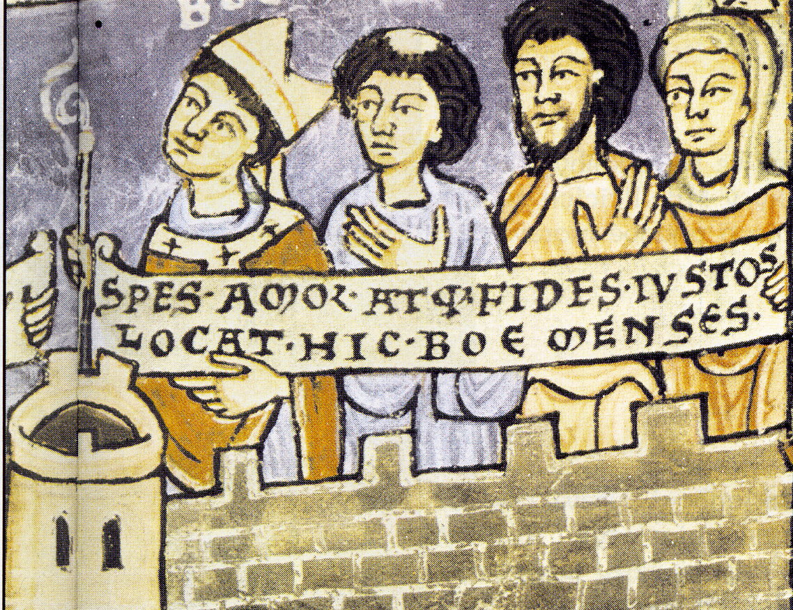 Page of a mediaeval manuscript: Augustinus: De civitate dei.